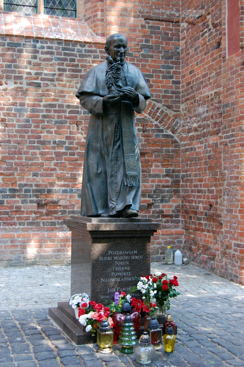 Toruń, przy katedrze, Radosław Ociepa, 2000.